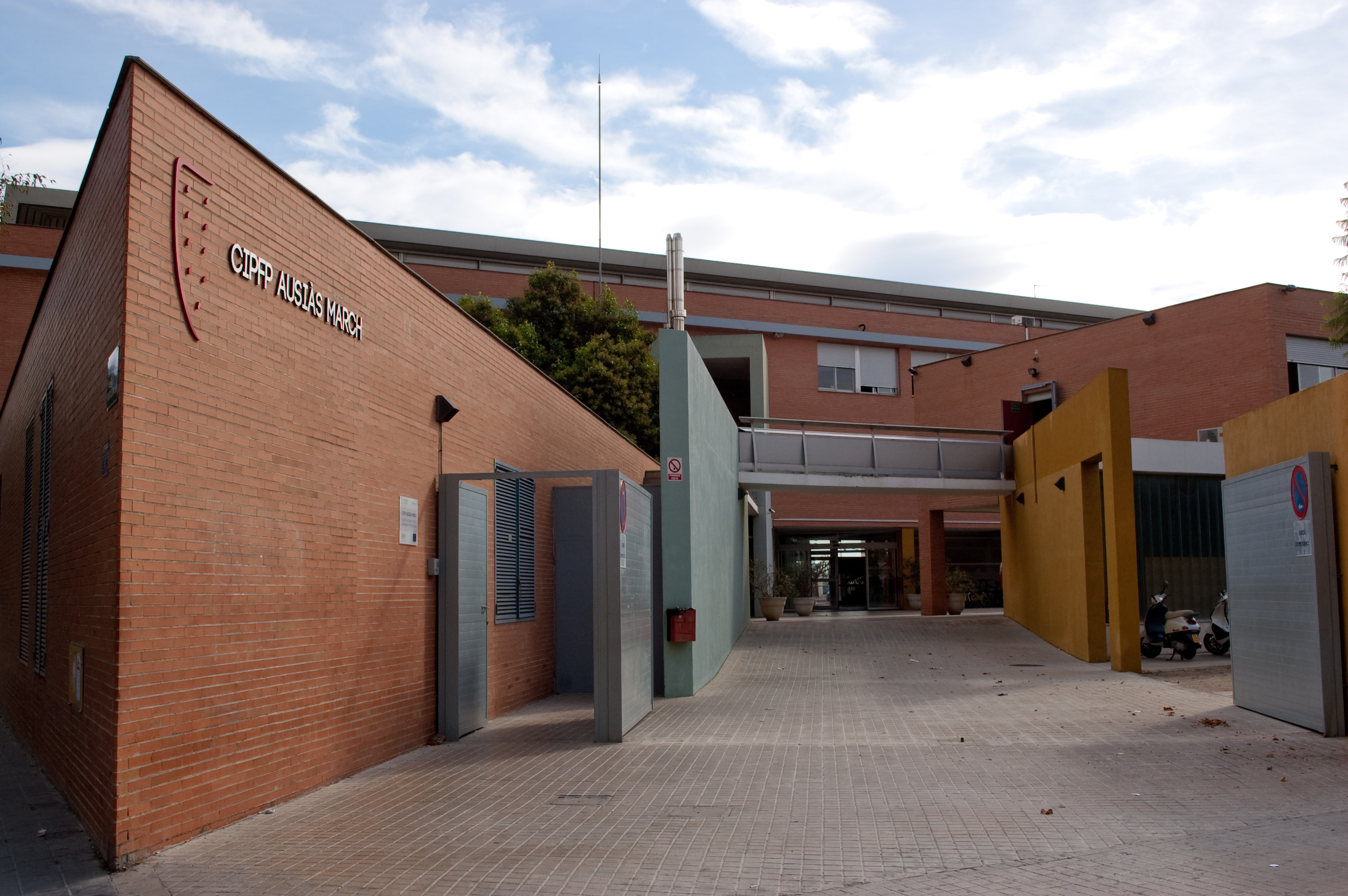 CIPFP Ausiàs March (Valencia). Entrada principal.